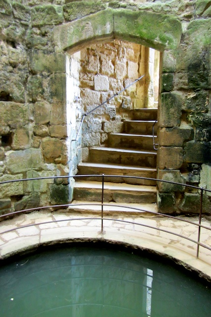 Bodiam Castle well.